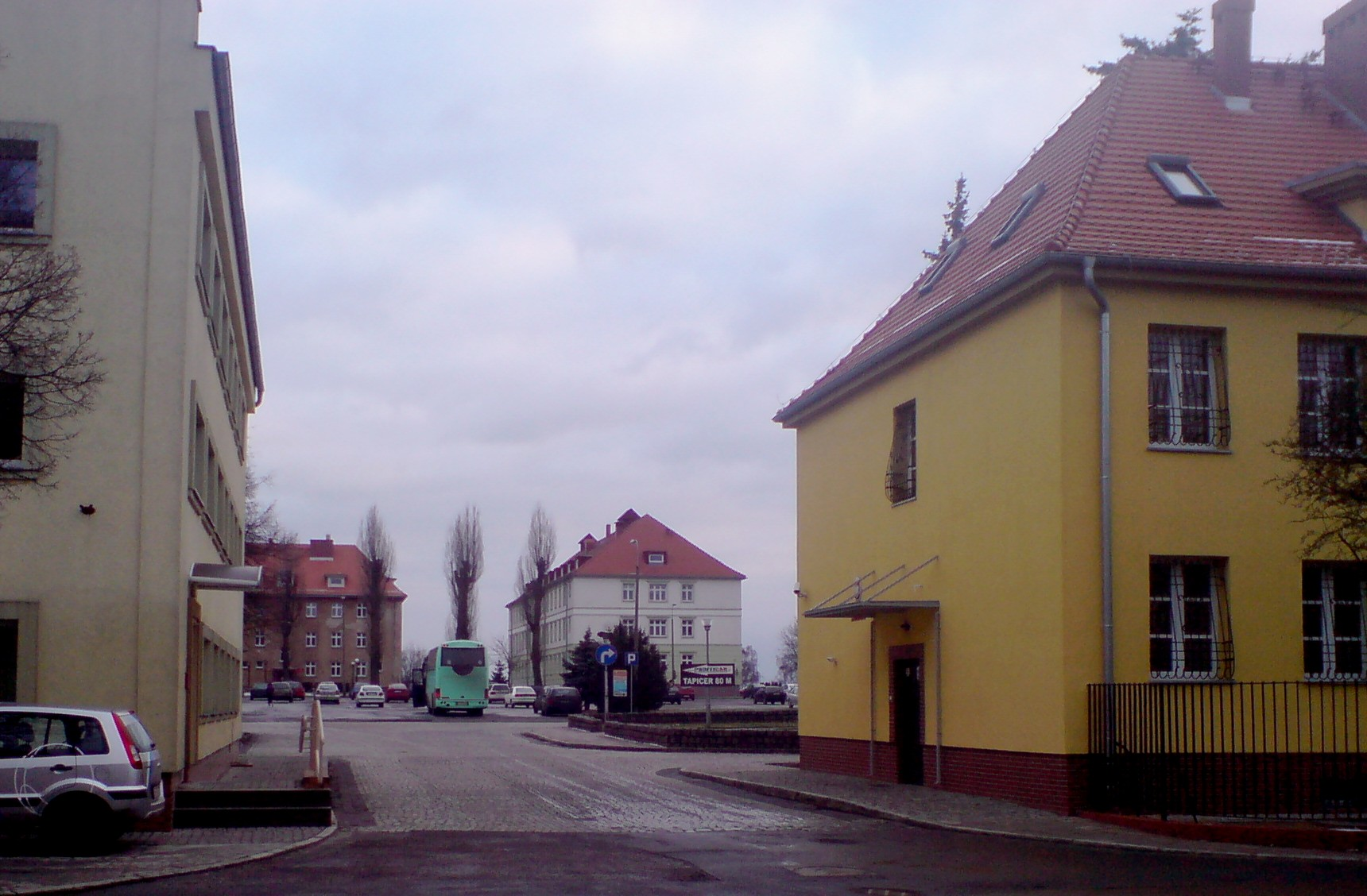 dawne koszary 4 Brygady Saperów w Gorzowie Wielkopolskim